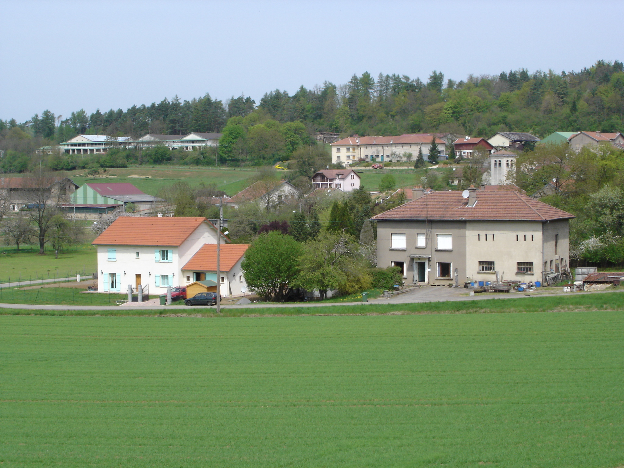 Le village de Martincourt en Meurthe-et-Moselle -- Photo perso prise par moi-même